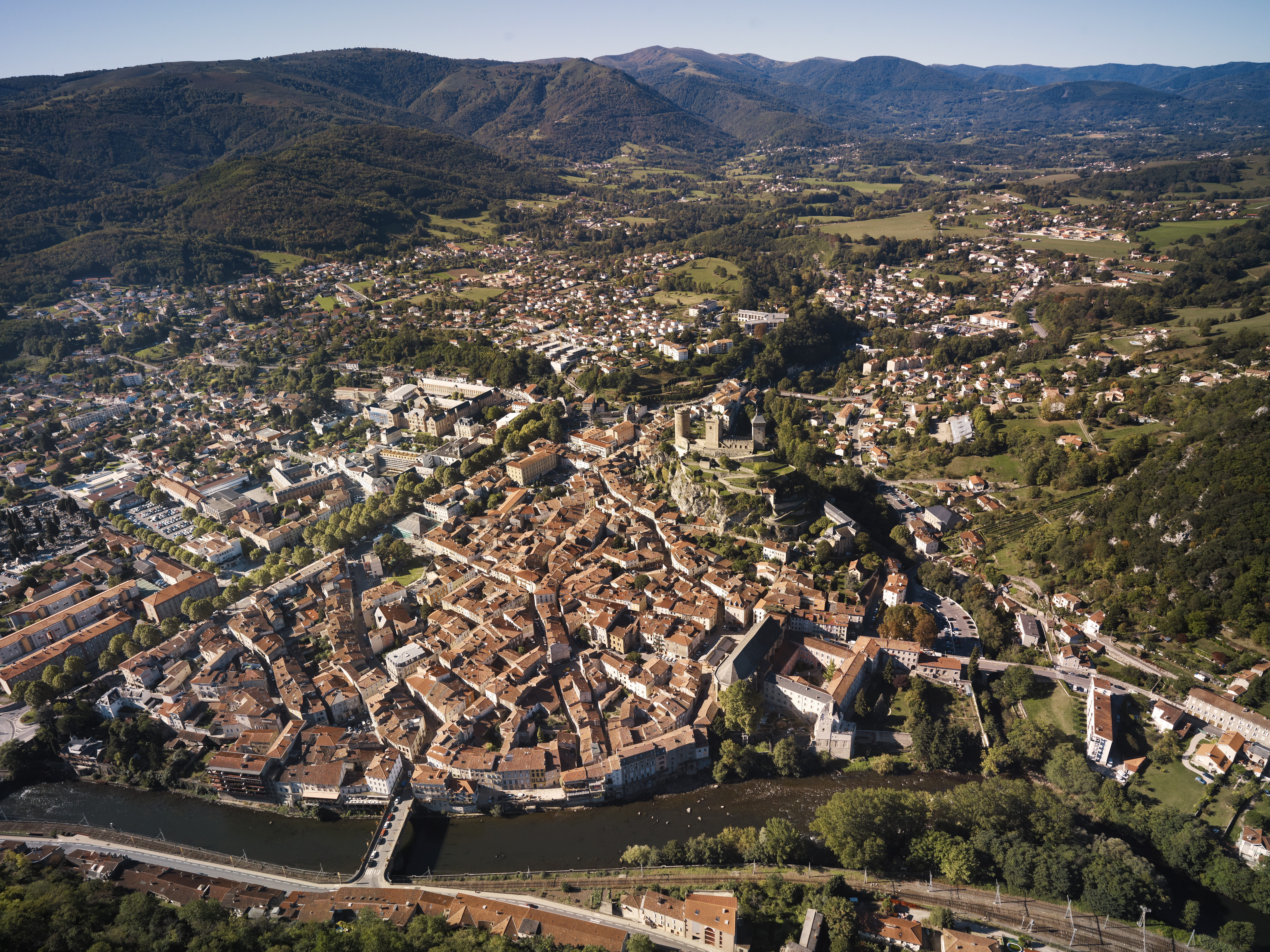 Office de tourisme